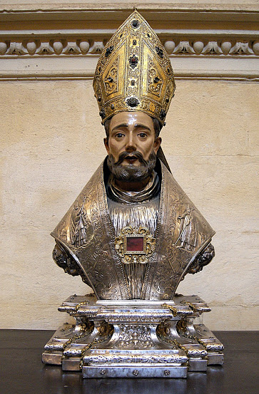 Busto-relicario de San Laureano, conservado en la sacristía mayor de la catedral de Sevilla, (España). Fue realizado por el orfebre Juan Laureano de Pina, que también es el autor de la urna barroca de plata en la que descansa el cuerpo incorrupto del rey Fernando III el Santo y que se halla en la Capilla Real de la catedral de Sevilla.